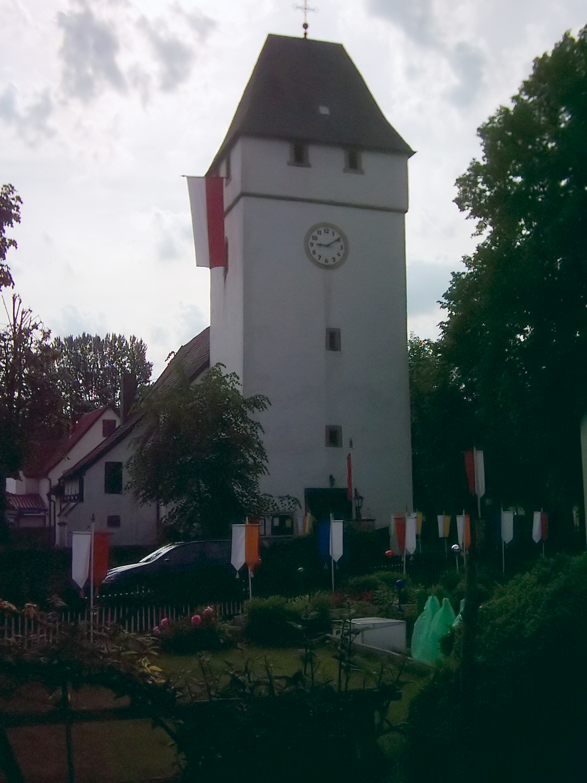 St. Kilian Kirche (Welda) Uploaded with Reworkhelper